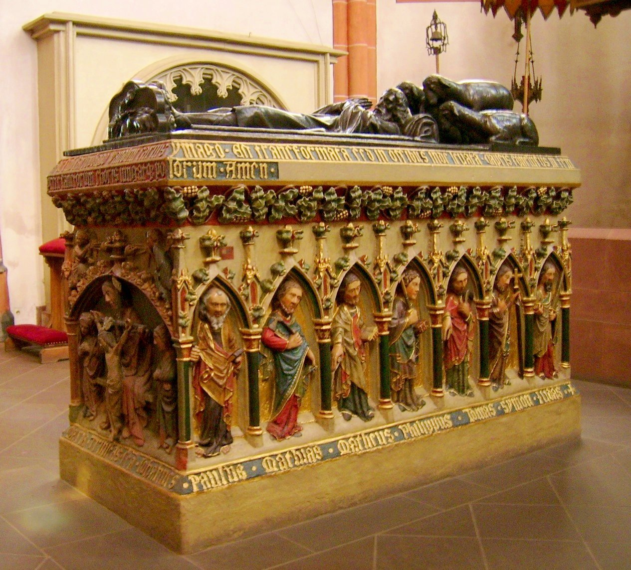 Sarg des heiligen Wendelinus in St. Wendel